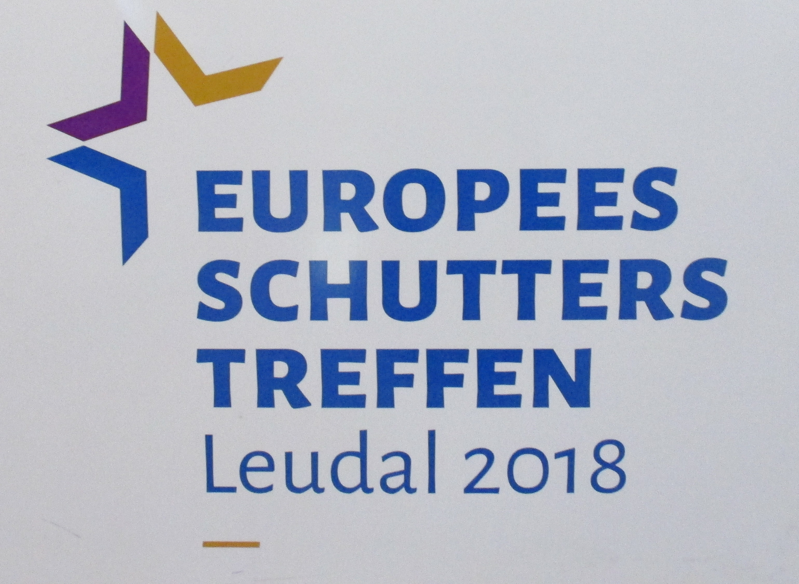 Logo van het Europees Schutterstreffen in Neer, Leudal.